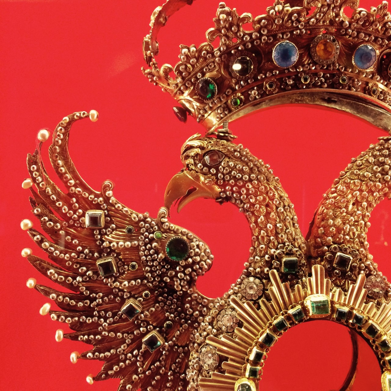 Detalle de la custodia del águila bicéfala, de la iglesia de San Agustín, Popayán, Colombia